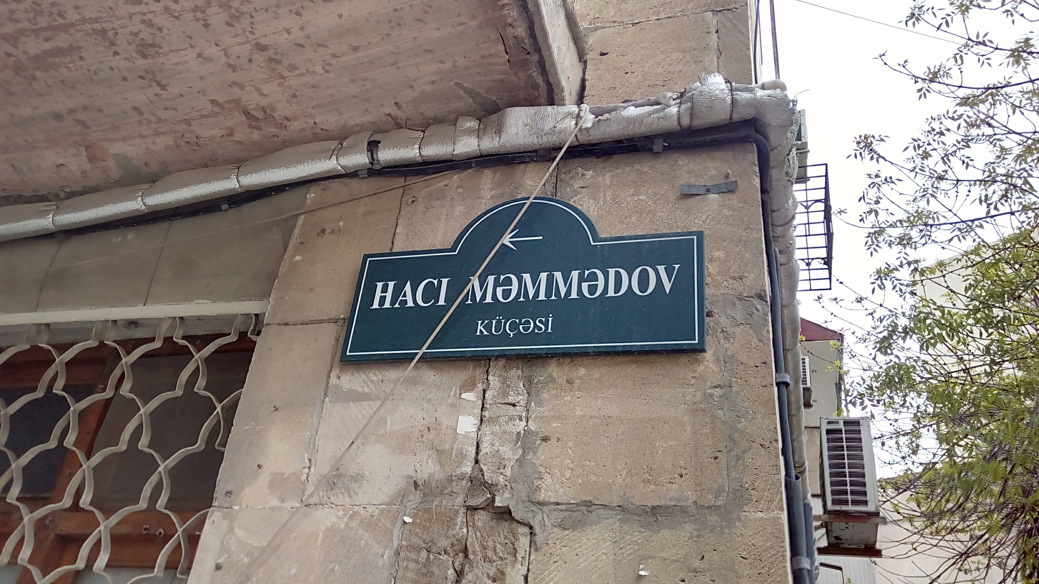 Bakı, Hacı Məmmədov küçəsi